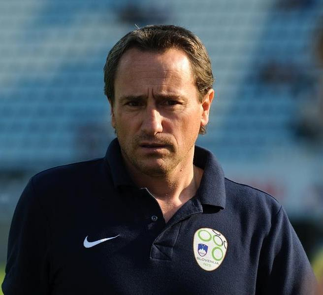 Прімож Гліха у фіналі Турніру пам'яті Валерія Лобановського 2015